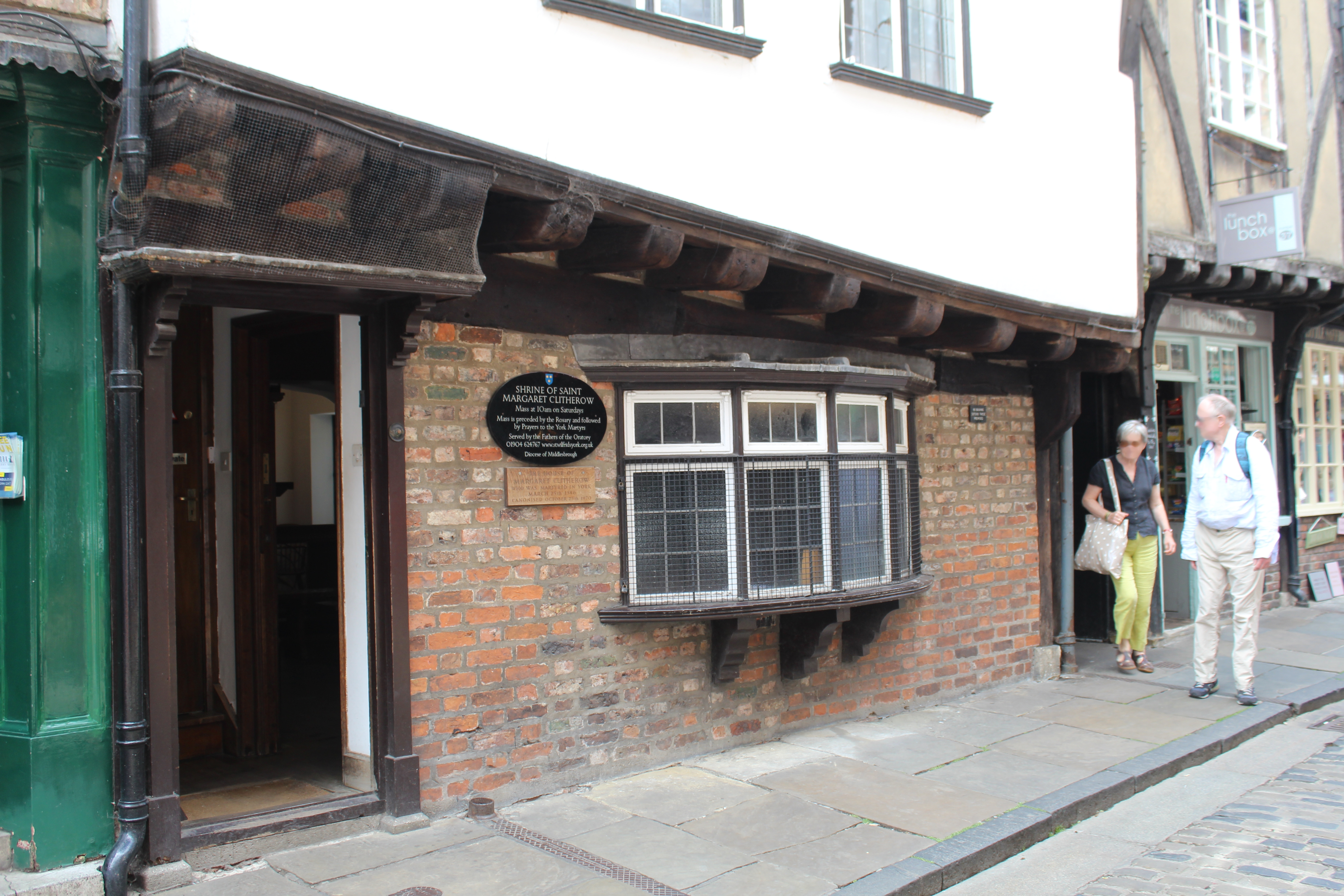 Sanctuaire de Sainte-Margaret Clitherow, York.